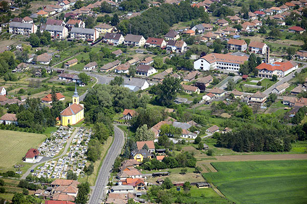 Madártávlatból